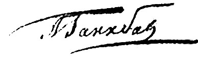 Автограф Абрама Петровича Ганнибала